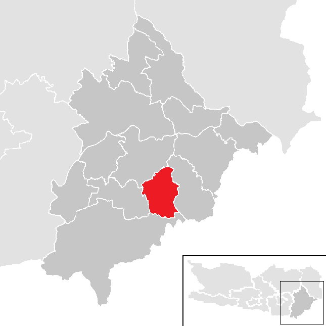 Bezirk Völkermarkt